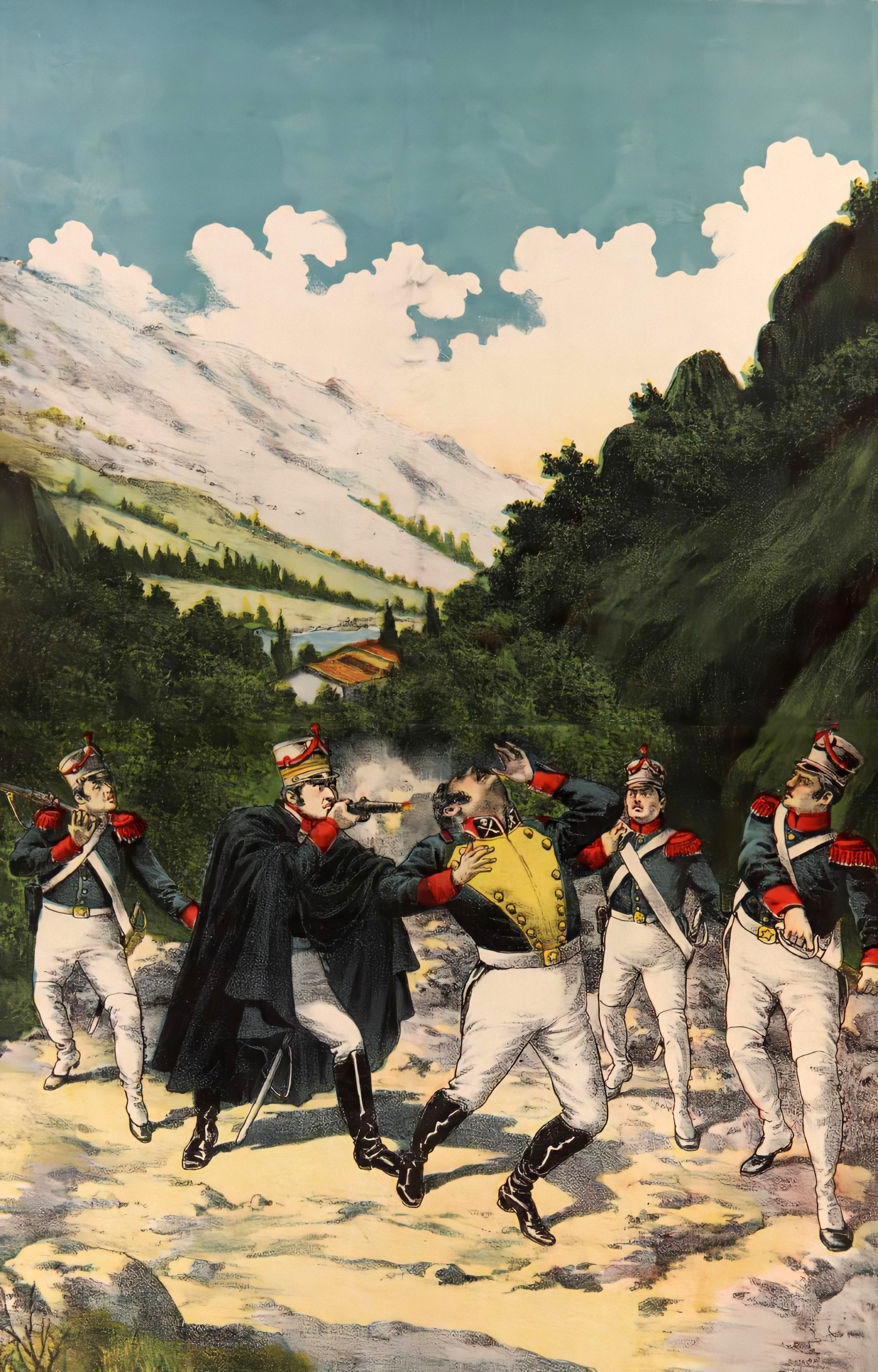 Litografia del asesinato de Manuel Rodriguez.